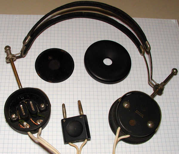 Magnetischer Kopfhörer aus der Detektorempfänger-Zeit. Auf der geöffneten Seite erkennt man die Magnetspulen und das Joch um sie herum, darüber die Eisenmembran und die aufschraubbare Ohrmuschel. Auf der Rückseite der anderen Hörerseite ist die Gravur „2000Ω“ zu erkennen. Das Kabel ist als Einziges nicht mehr original und ist später ersetzt worden.